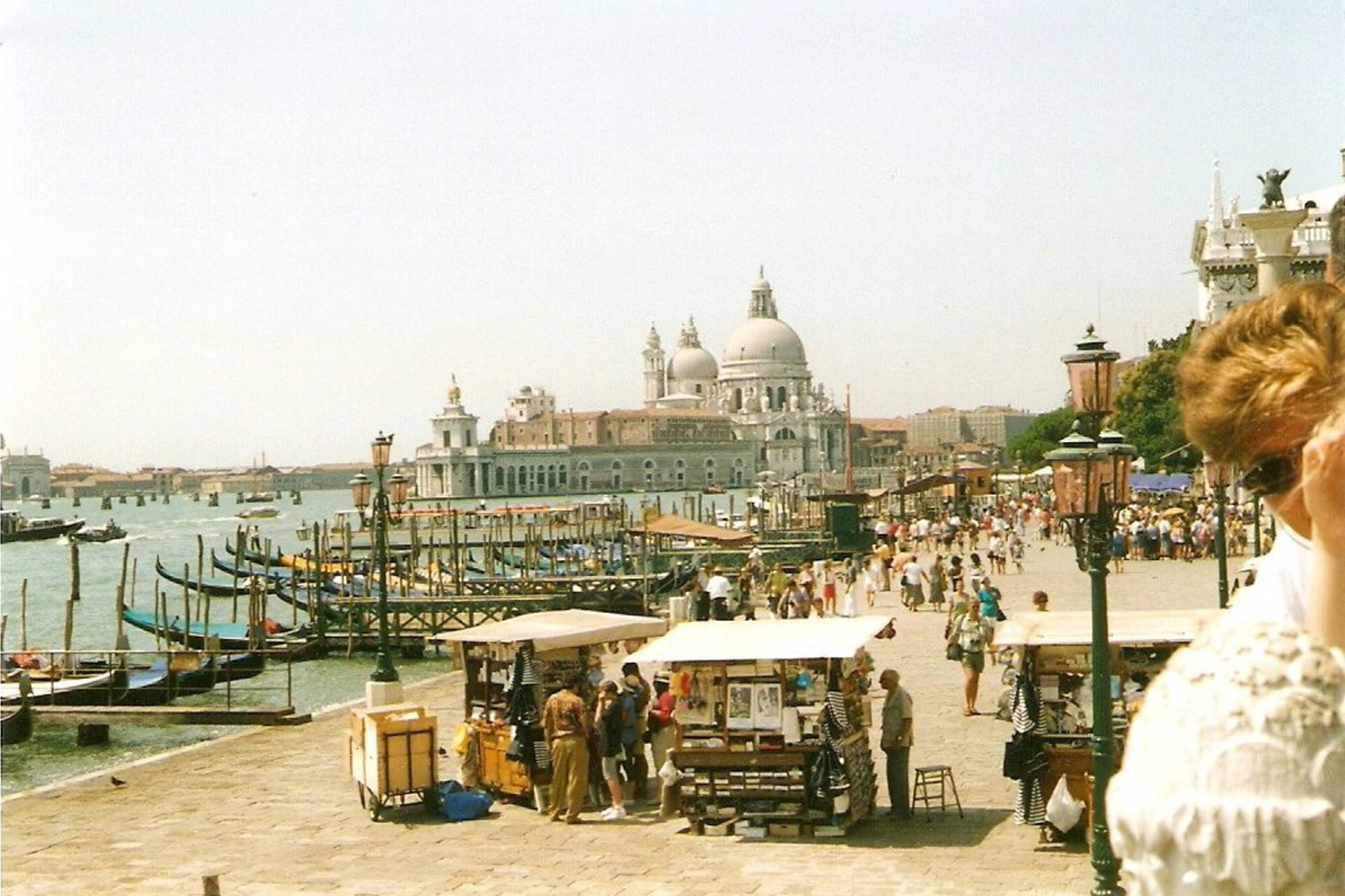 Benátky (Venezia)